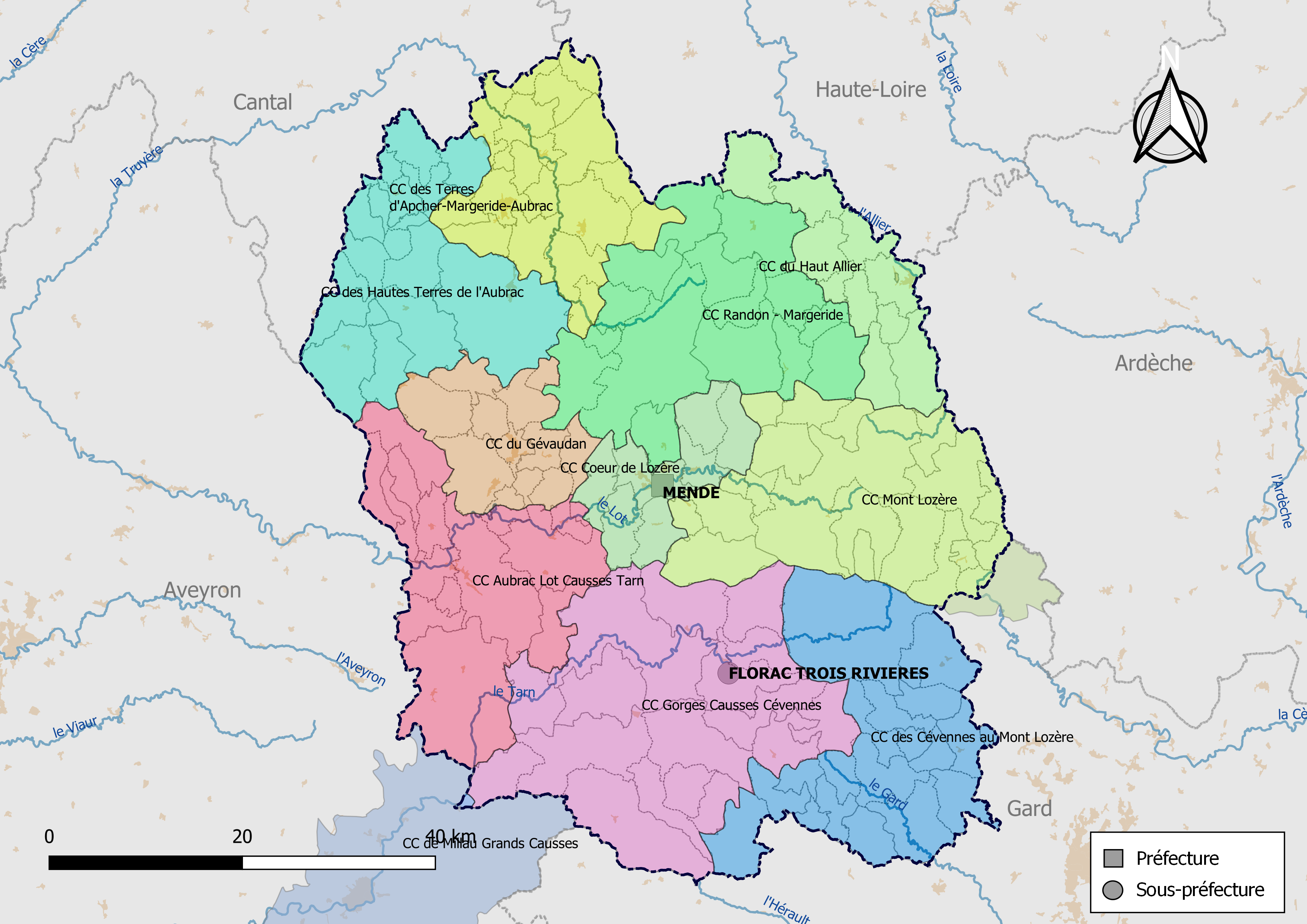 Carte des intercommunalités du département de la Lozère, France. Composition au 1er janvier 2019.